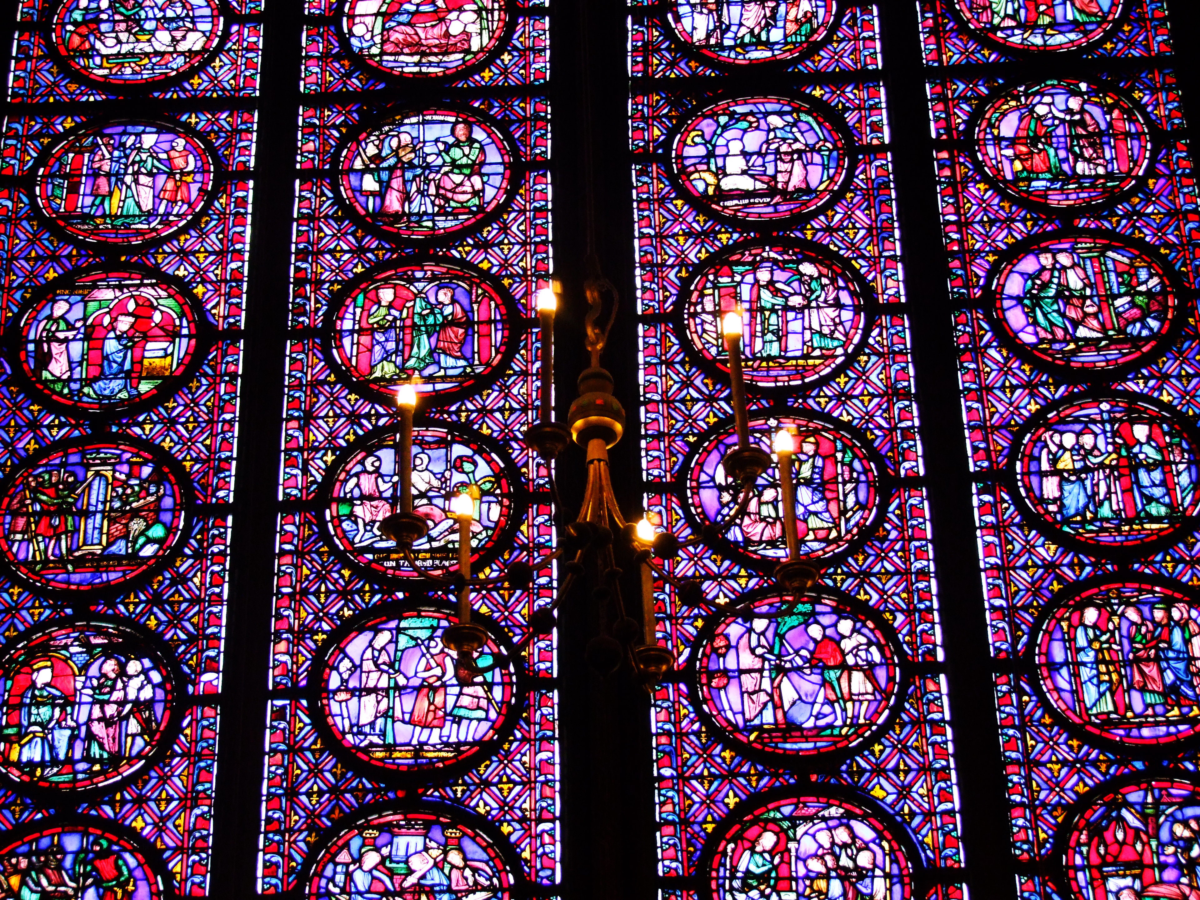 Sainte Chapelle (vitraux et chandelier), Paris .